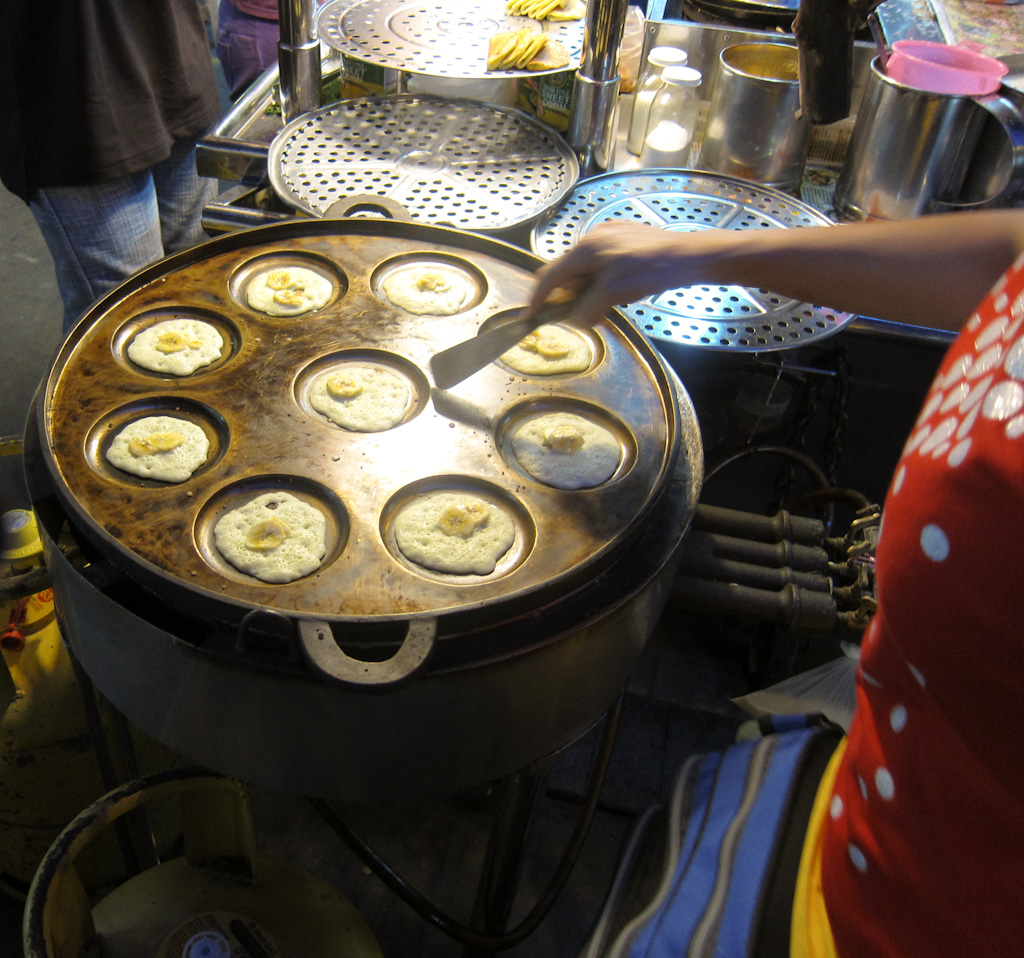 baking apom in penang